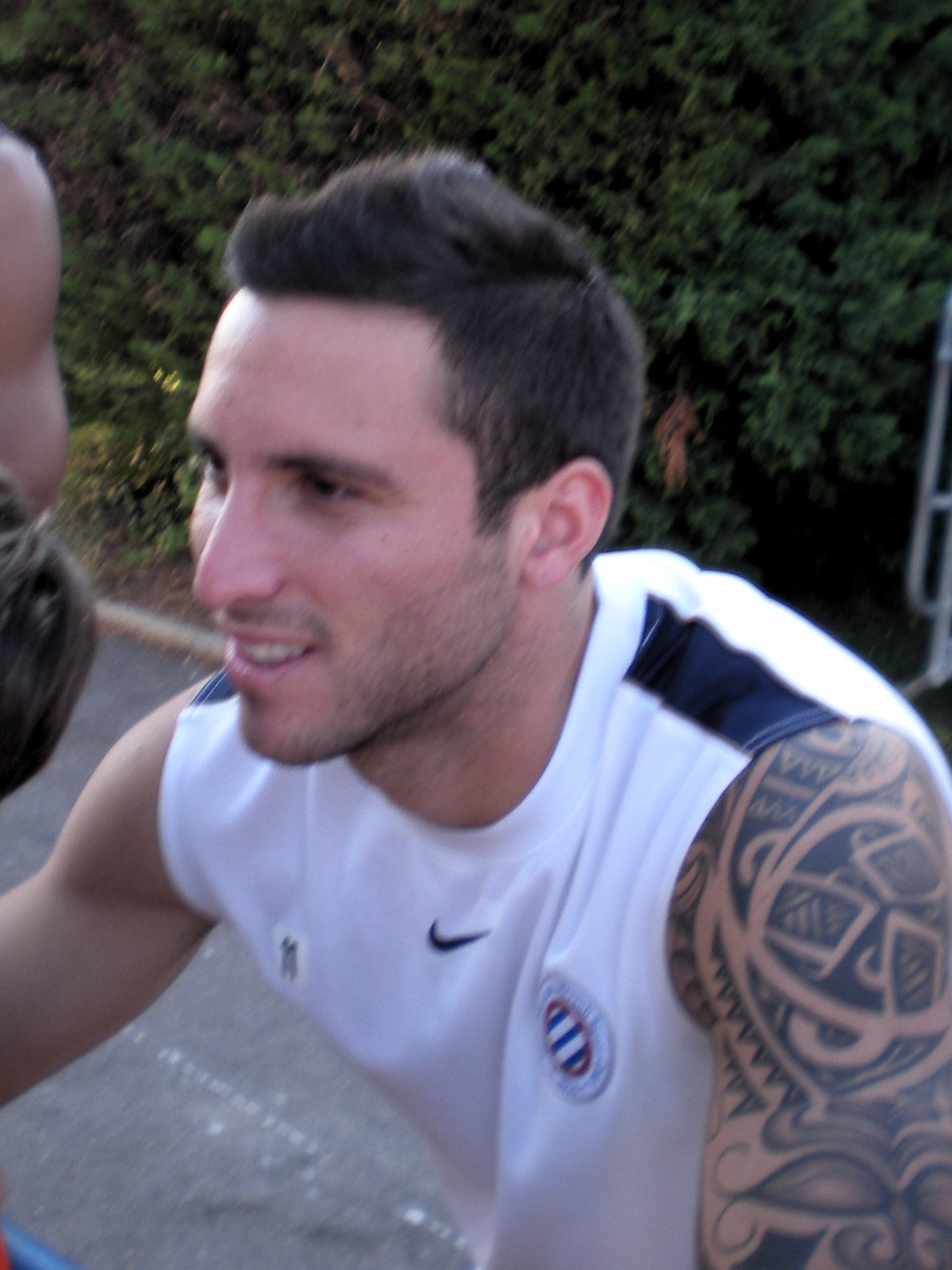 Emanuel Herrera à Montpellier.